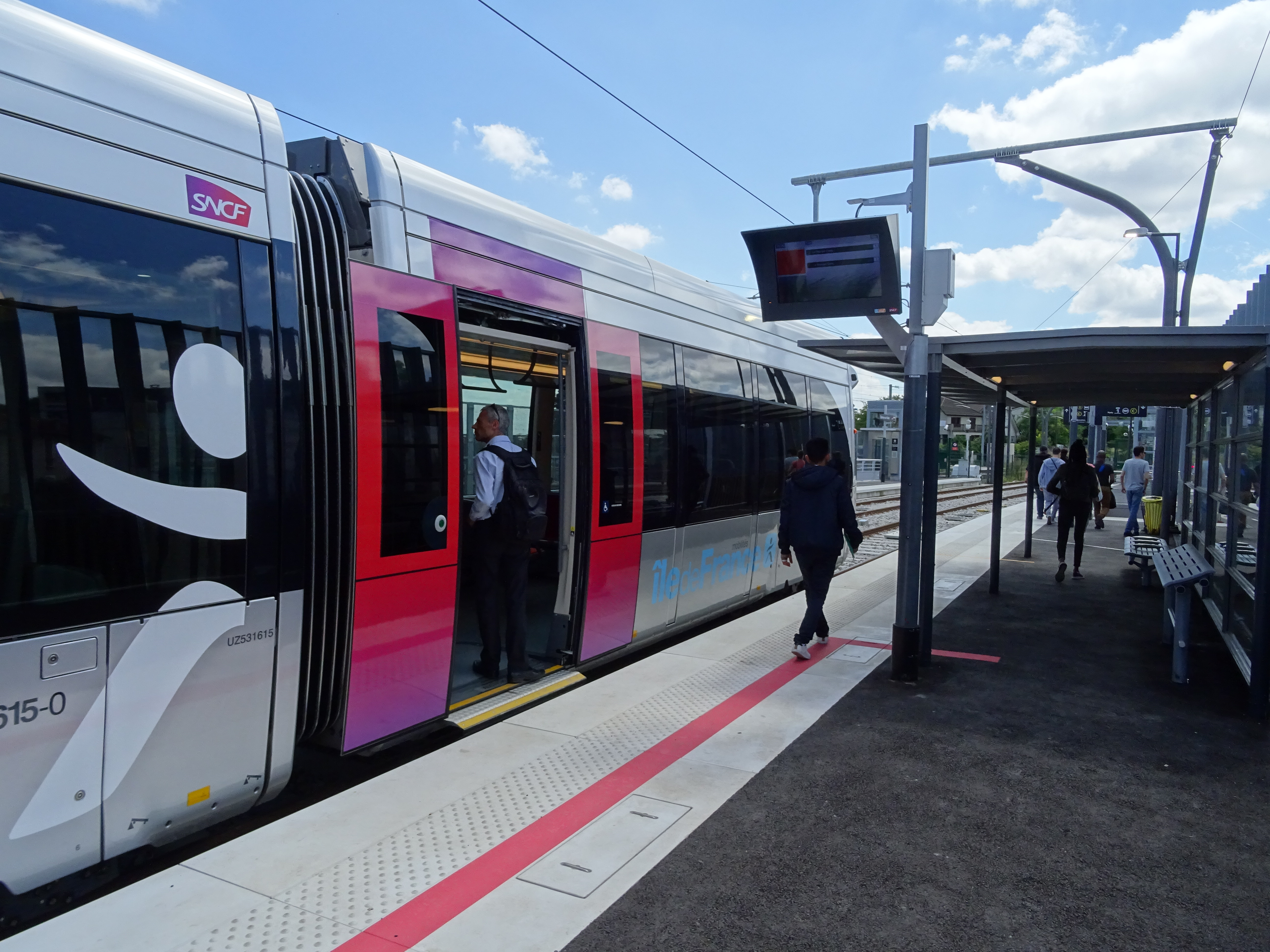 U 53600 avec ses portes ouvertes en gare d'Epinay-sur-Seine.